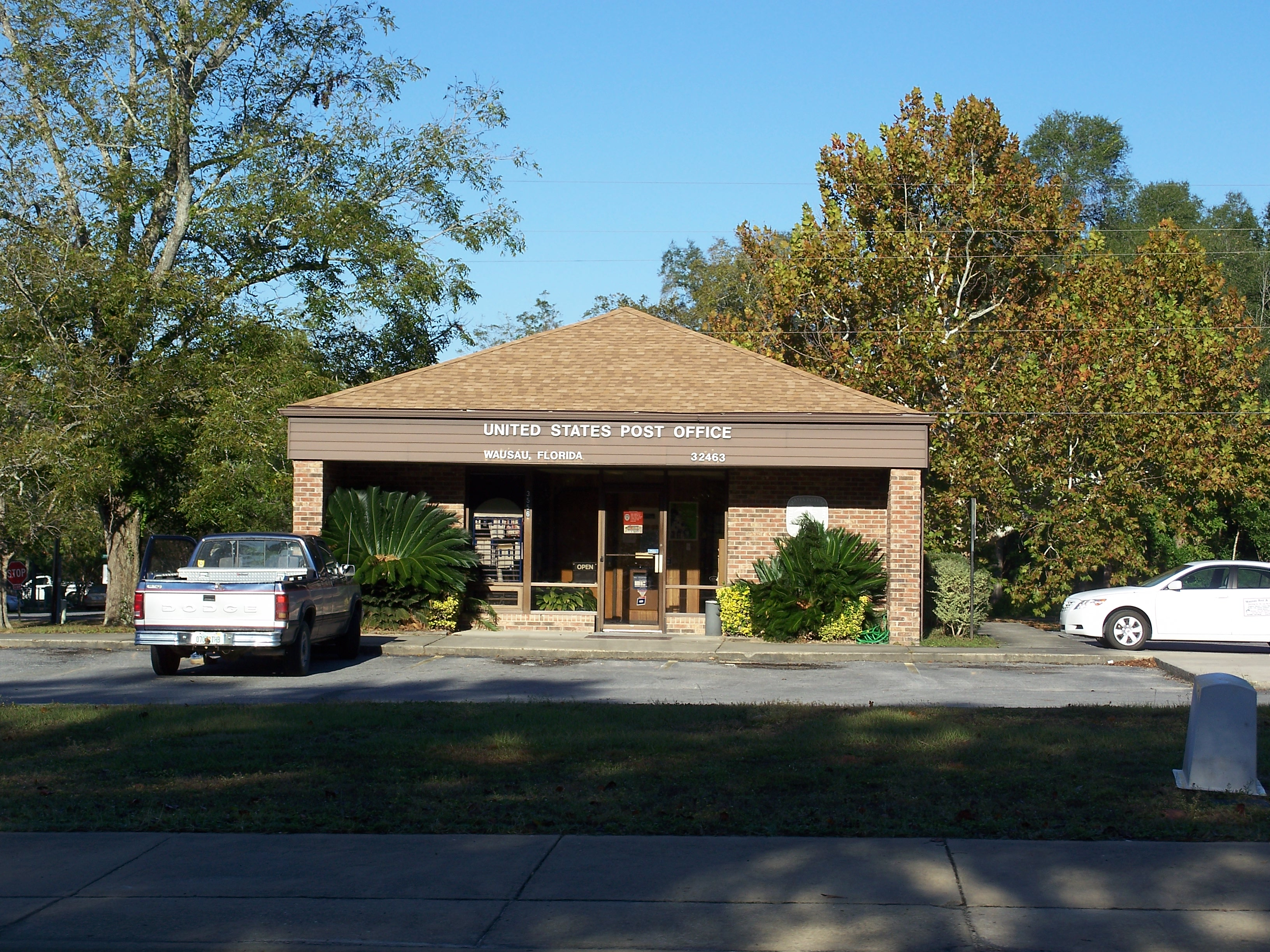 Wausau, Florida: Post office